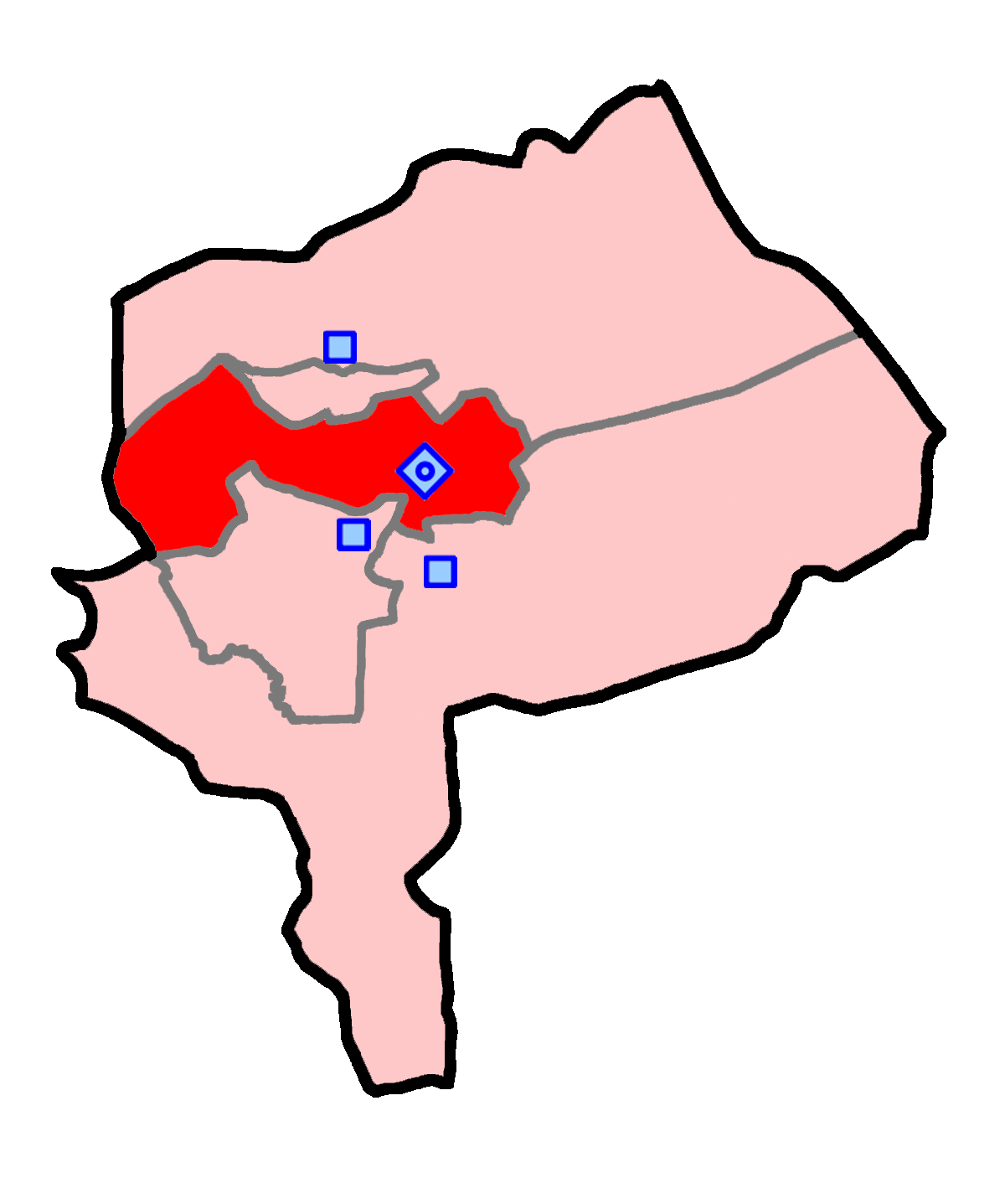 حوزهٔ انتخاباتی یزد و صدوق برای انتخابات مجلس شورای اسلامی